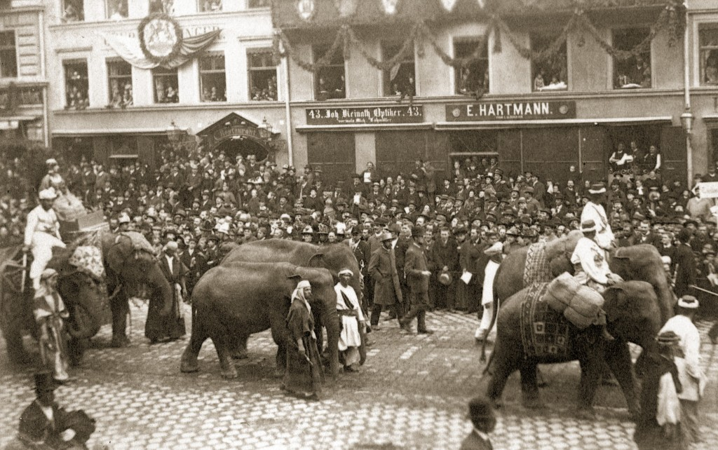 Elefanten beim Festzug zur Centenarfeier am 31. August 1888 in München